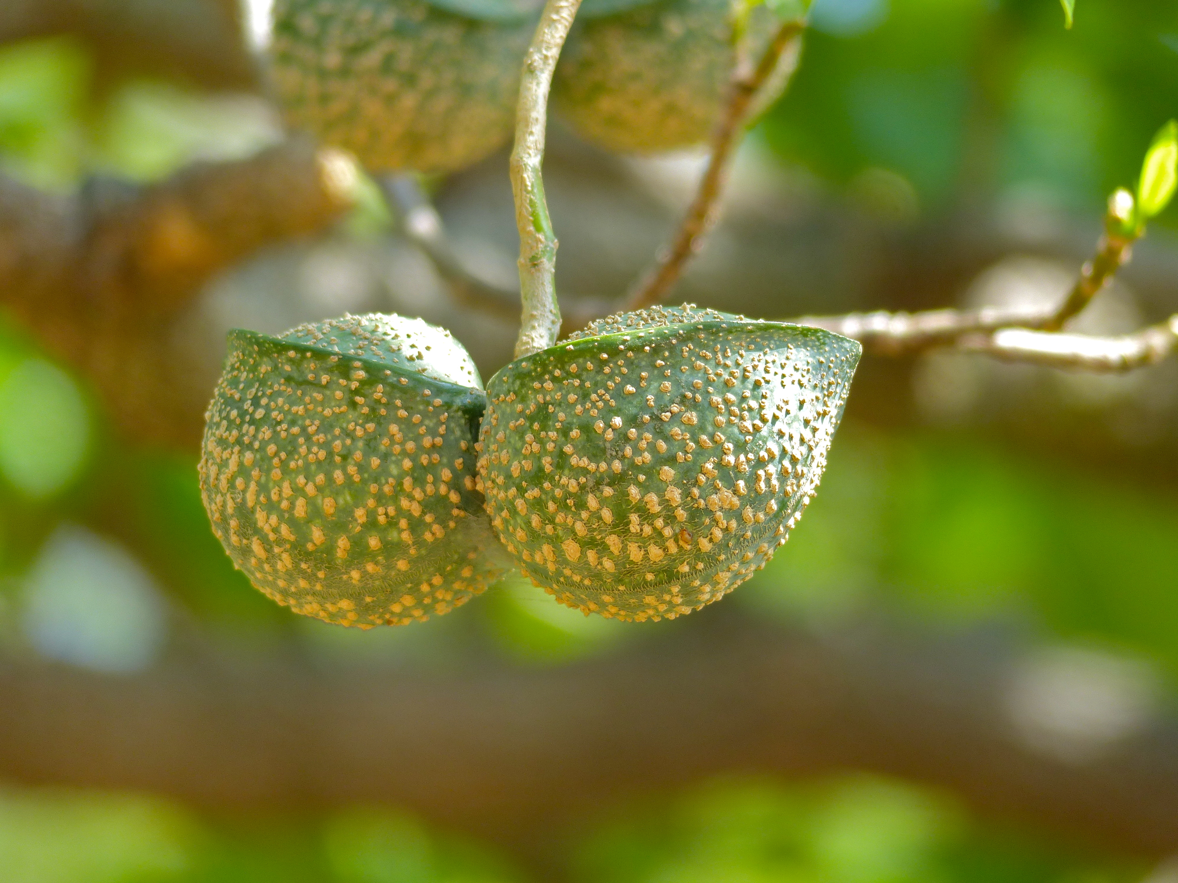 Mahonie Loop near Punda Maria, Kruger NP, SOUTH AFRICA